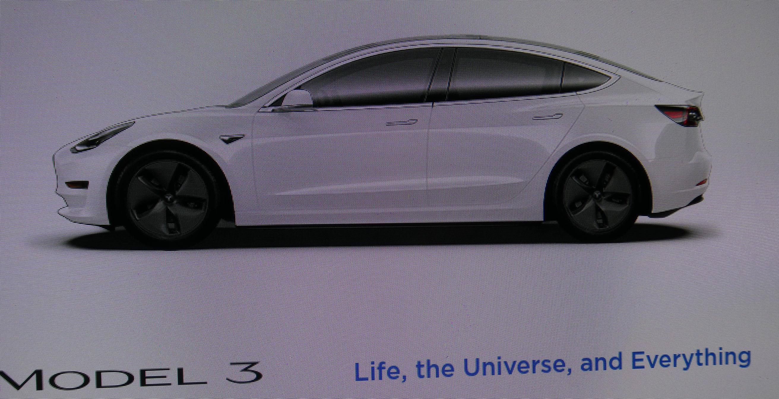 Huevo de Pascua en vehículos Tesla sobre la vida, el universo y todo. Si se nombra el coche 42, el nombre del coche cambia a «Life, the Universe, and Everything» (La vida, el universo y todo). En el libro de Douglas Adams The Hitchhiker’s Guide to the Galaxy (Guía del autoestopista galáctico) se le pregunta al superordenador Deep Thought cuál es el significado de la vida y tras 7.5 millones de años responde: «42».